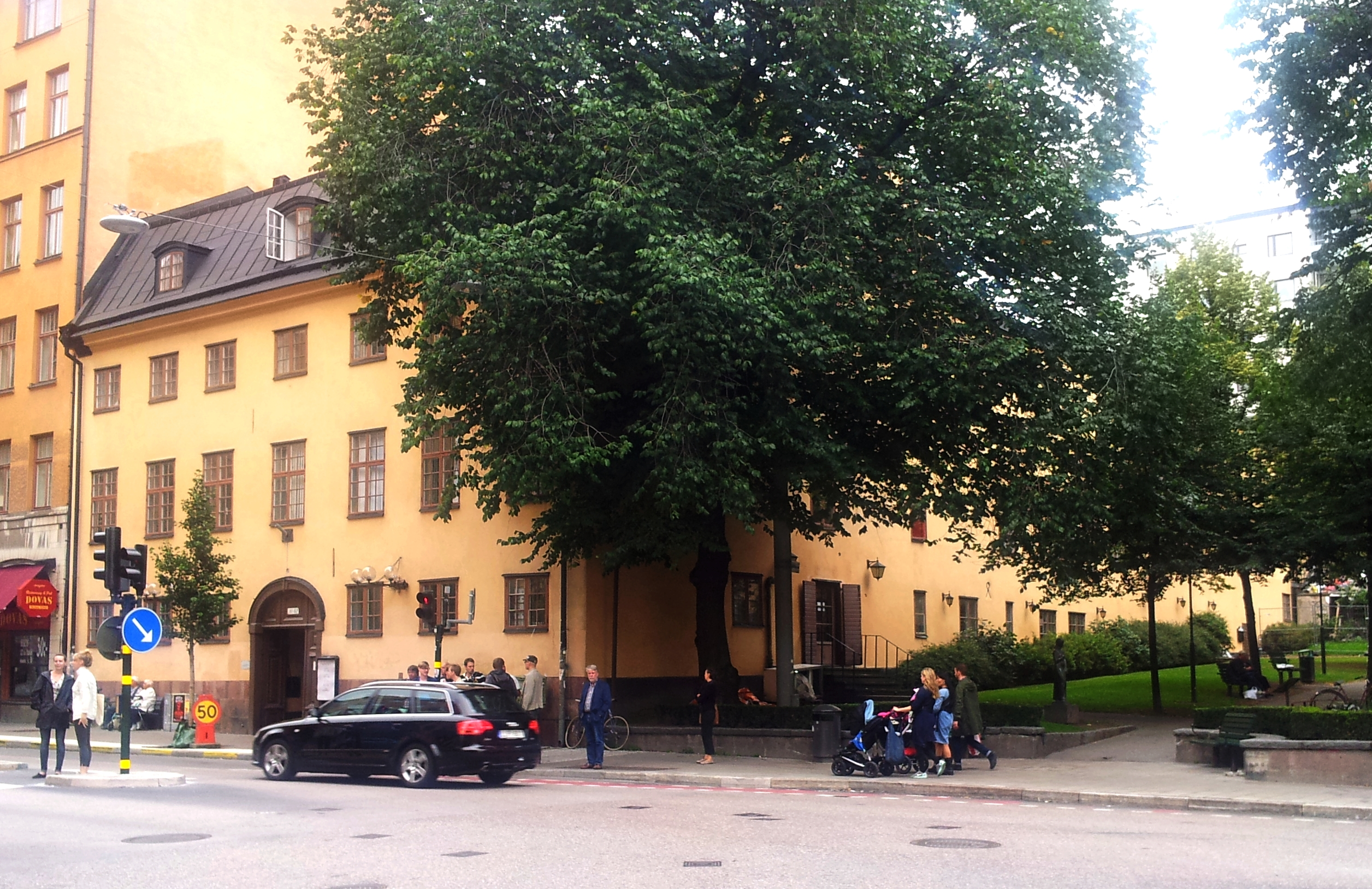 Stockholms bysättningsfäkte, Bysis, Hornsgatan 82, Stockholm, aug 2012